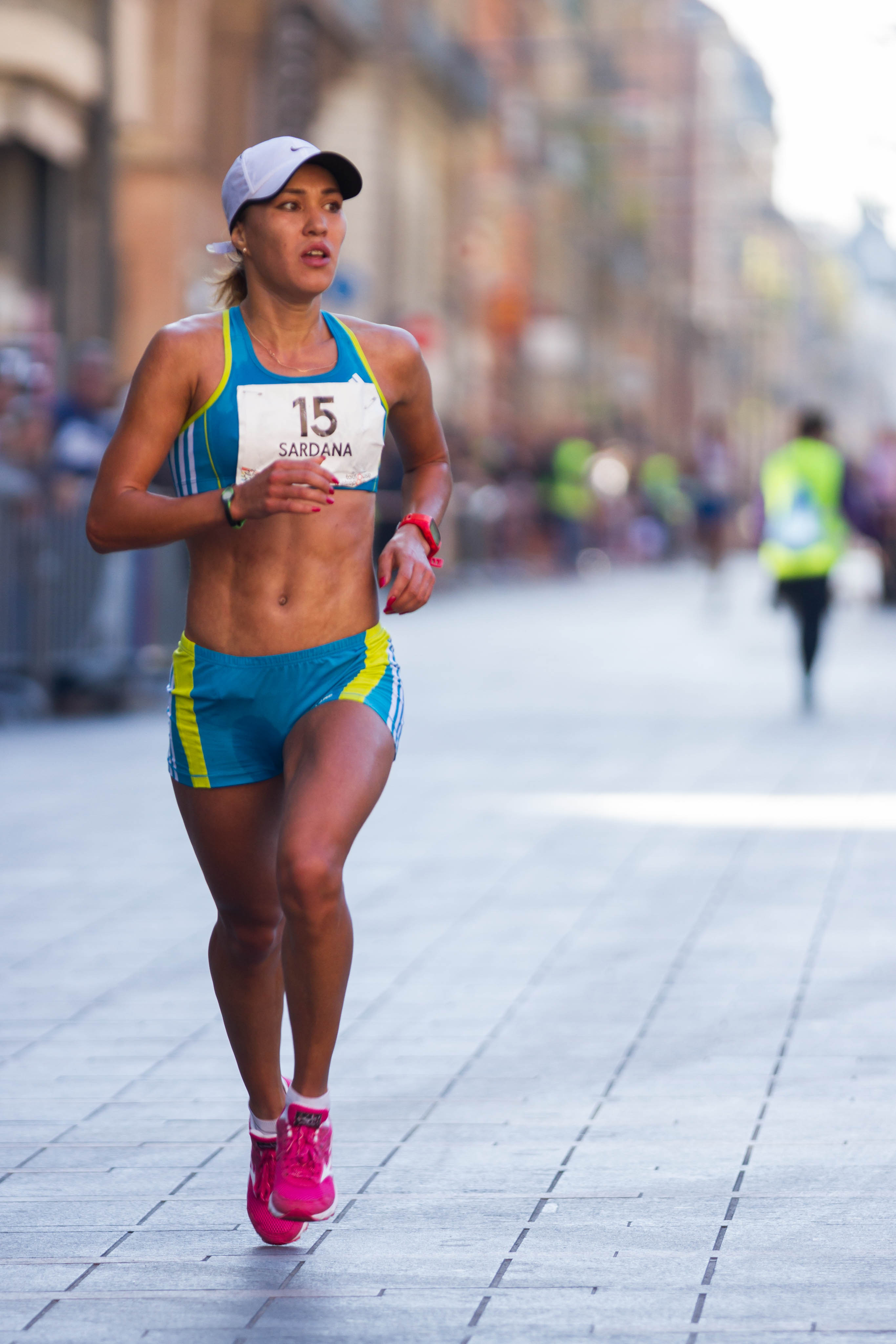 Sardana Trofimova au Marathon de Toulouse Métropole 2014